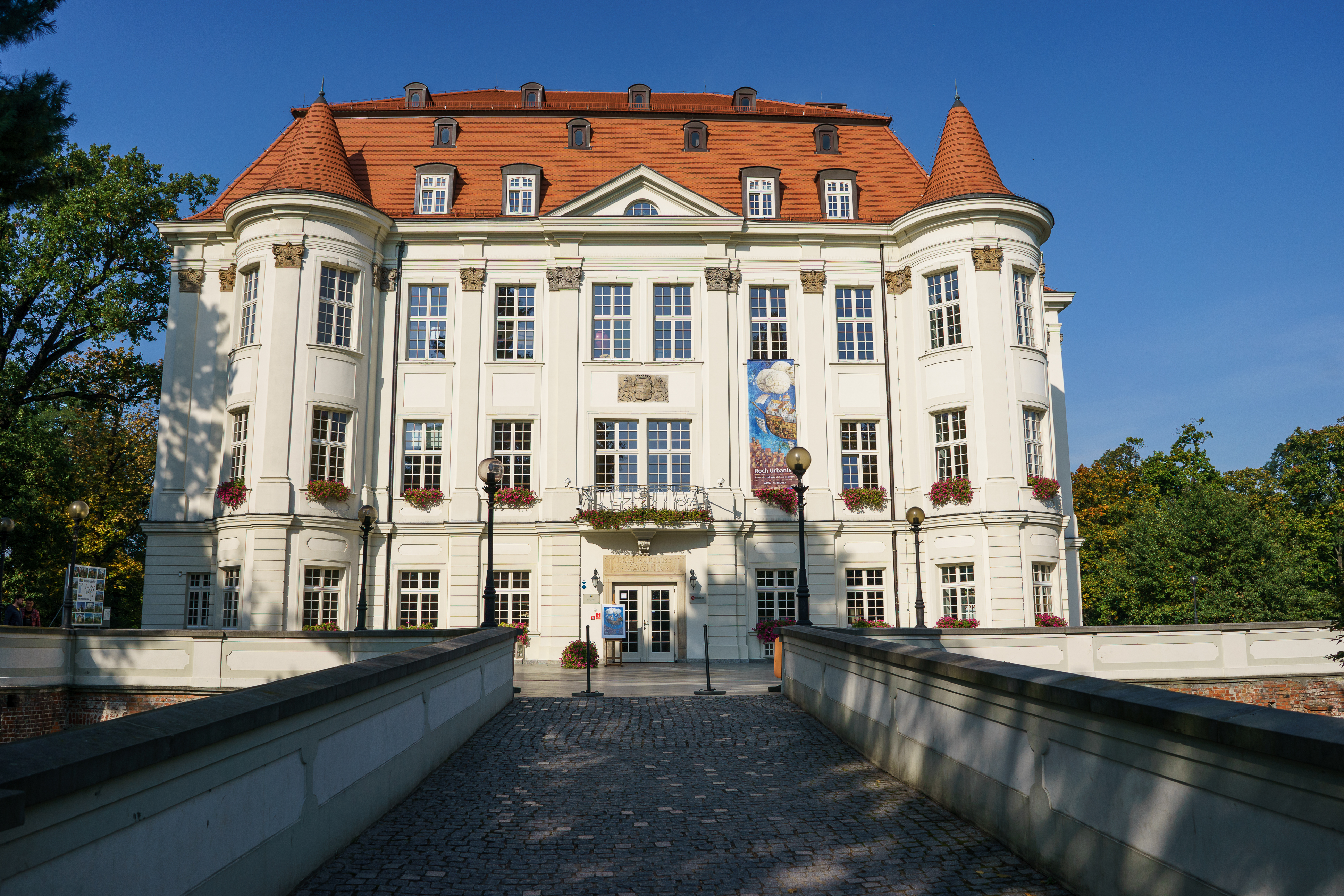 Zamek w Leśnicy koło Wrocławia